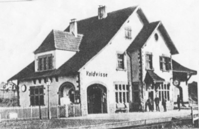 Waldwisse(Moselle) Bahnhof